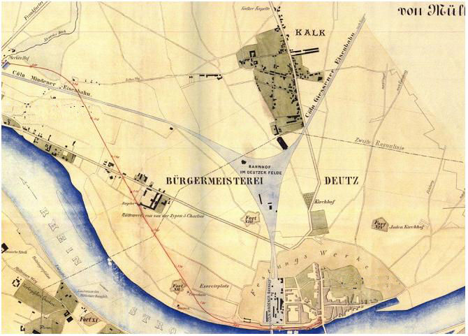 Karte der Köln-Mindener Eisenbahn; Ausschnitt Köln-Deutz und Kalk; Der Ortsteil Kalk liegt außerhalb der zweiten Rayonlinie der Kölner Stadtbefestigung östlich (!) von Deutz